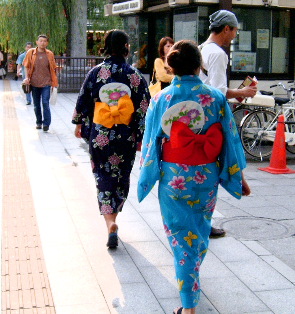 Summer yukata in Tokyo